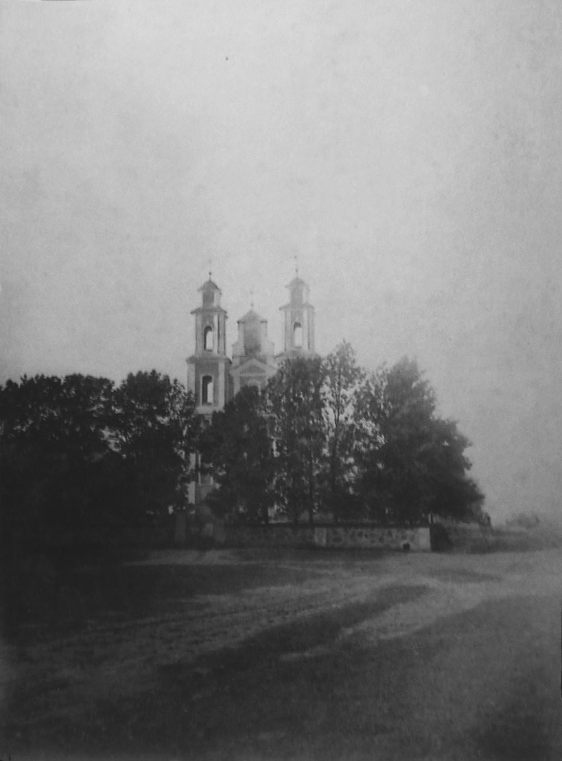 Беларуская (тарашкевіца): Германавічы (Hiermanavičy). Касьцёл Перамяненьня Пана